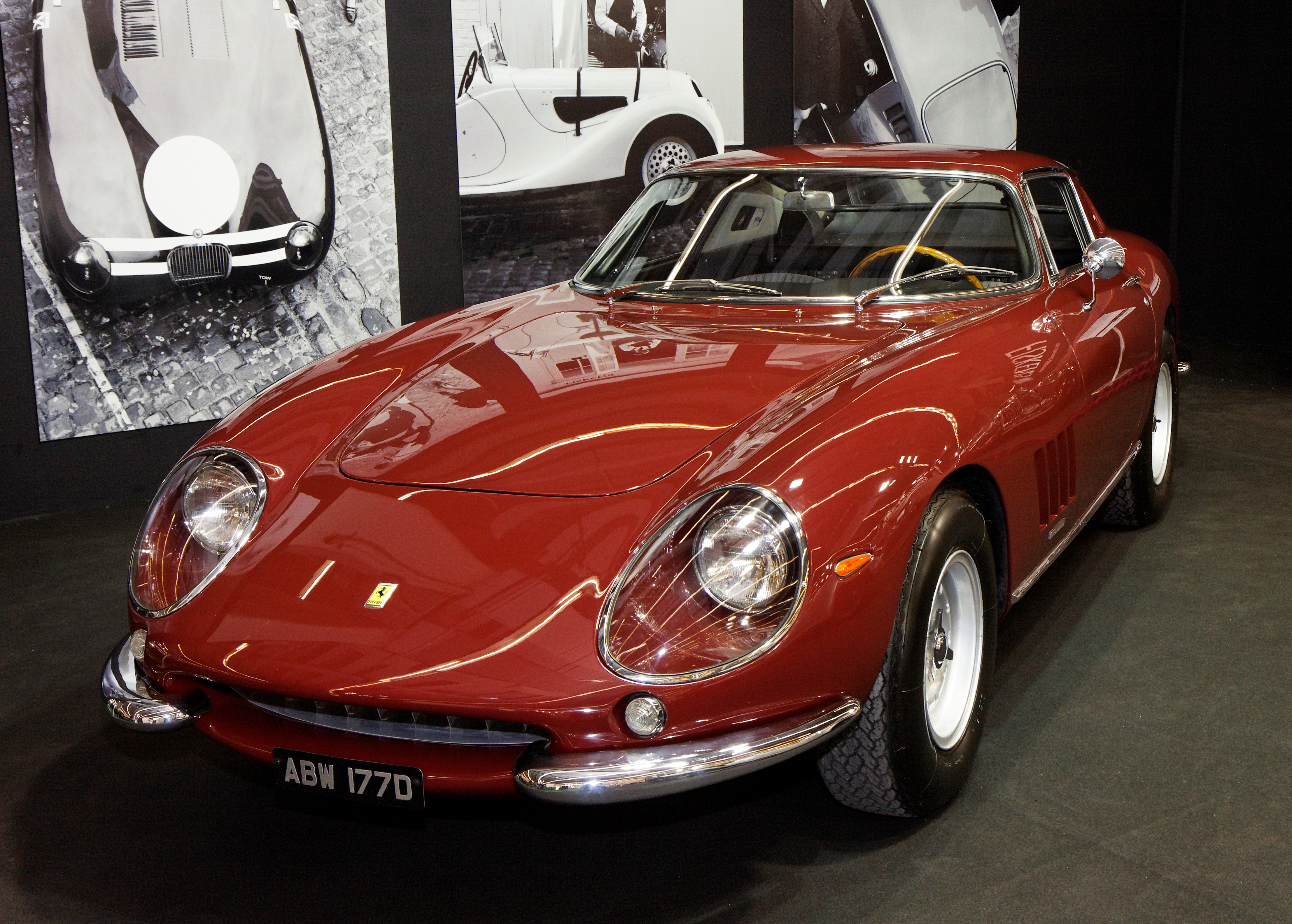 Photographie prise lors du salon rétromobile 2011 à Paris, porte de Versailles.